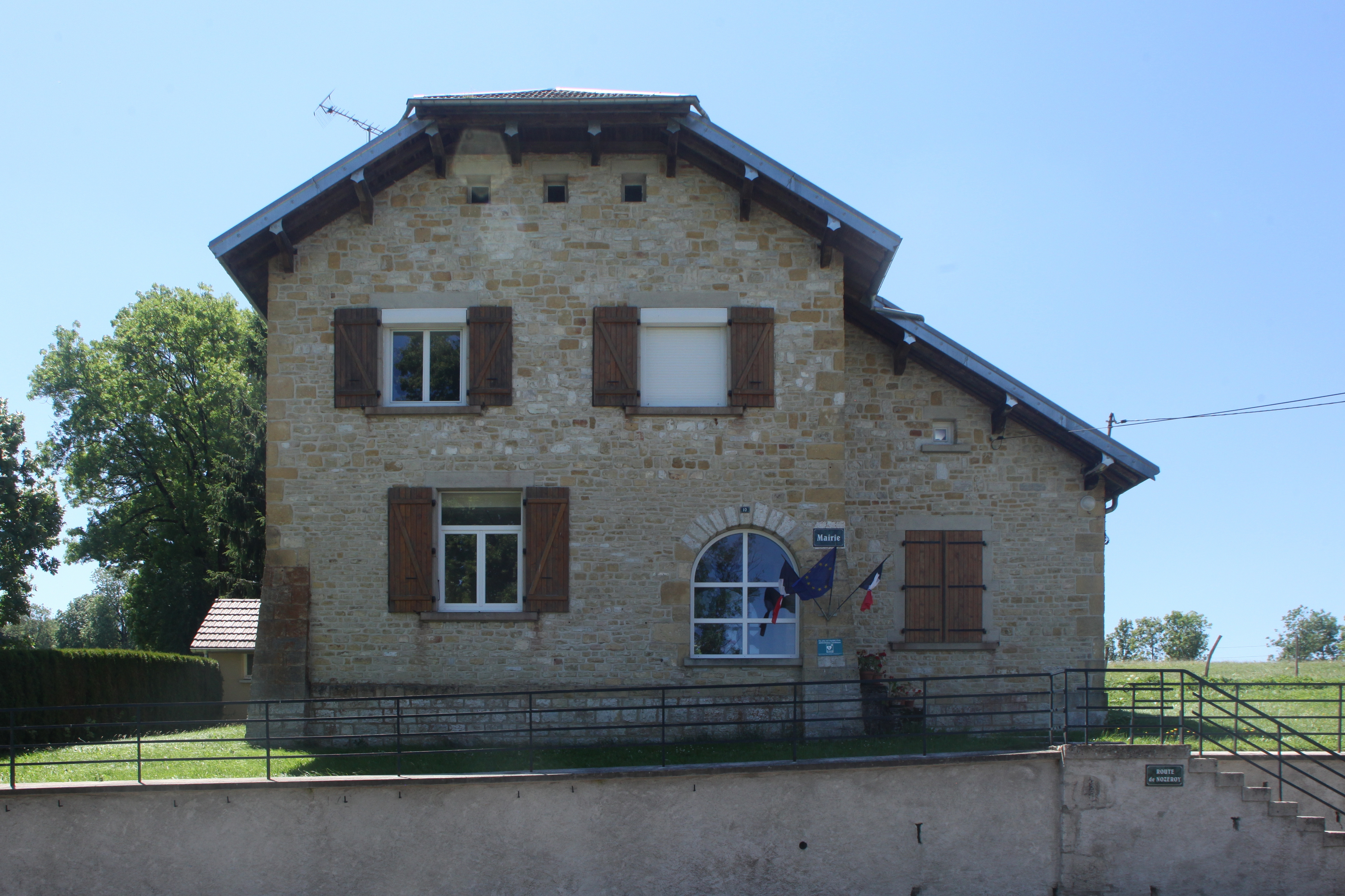 Mairie de Rix-Trébief (Jura).